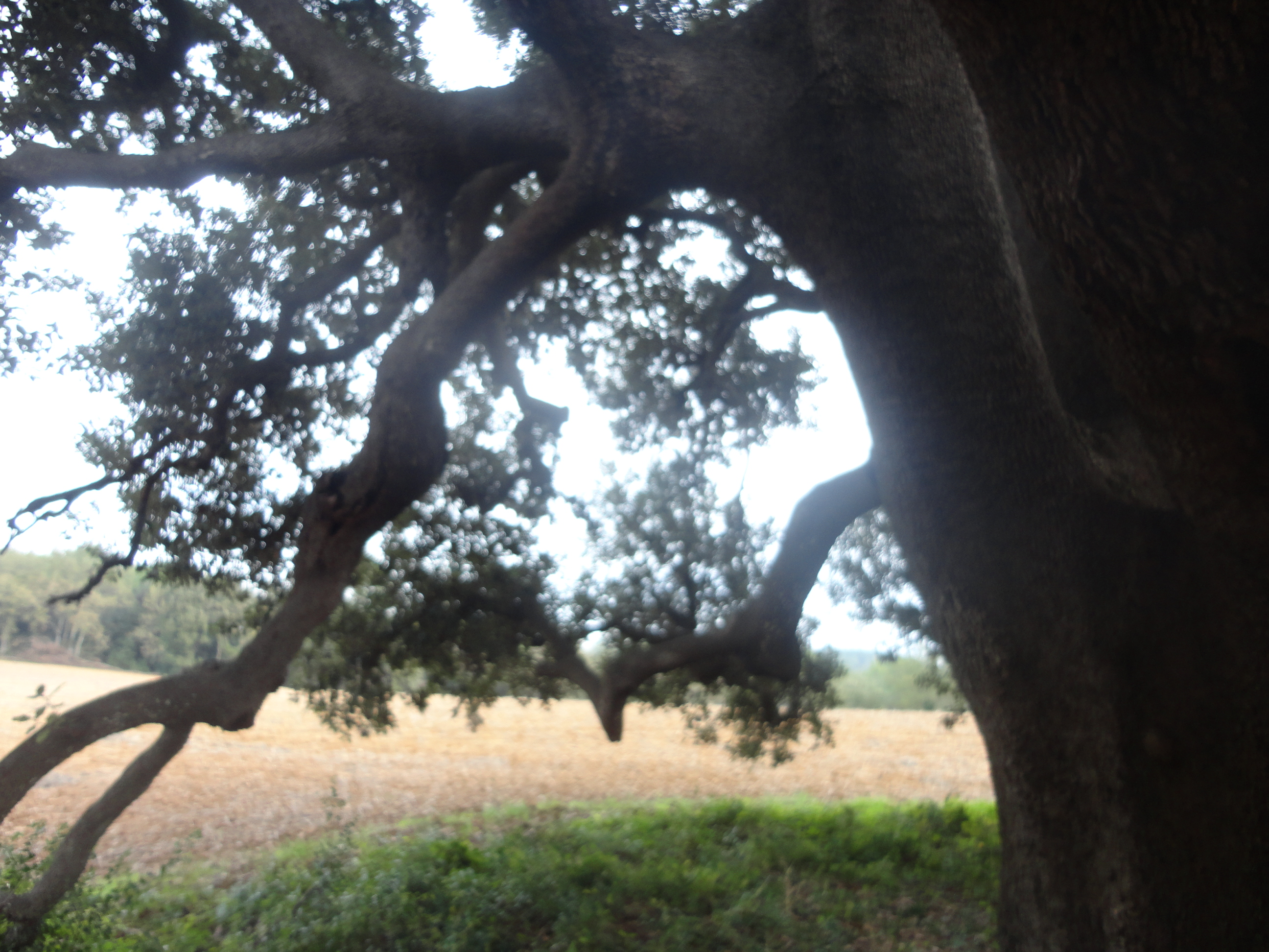 Aulina Reclamadora de l'Omeda (Fontcoberta) This is a a photo of a protected or outstanding tree in Catalonia, Spain, with id: MA-28.071.02